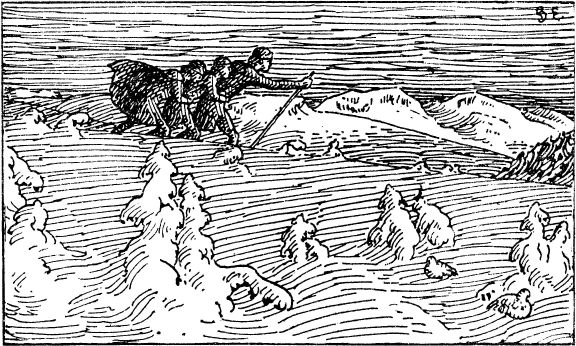 Halfdan Egedius: Illustration for Olav den helliges saga. Snorre 1899-edition. «Torodd og hans Følgesvænd på Ski med Arnljot Gelline.» nb: «Torodd og følgesveinen hans på ski med Arnljot Gelline.» nn: «Torodd og følgjesveinen hans på ski med Arnljot Gelline.»